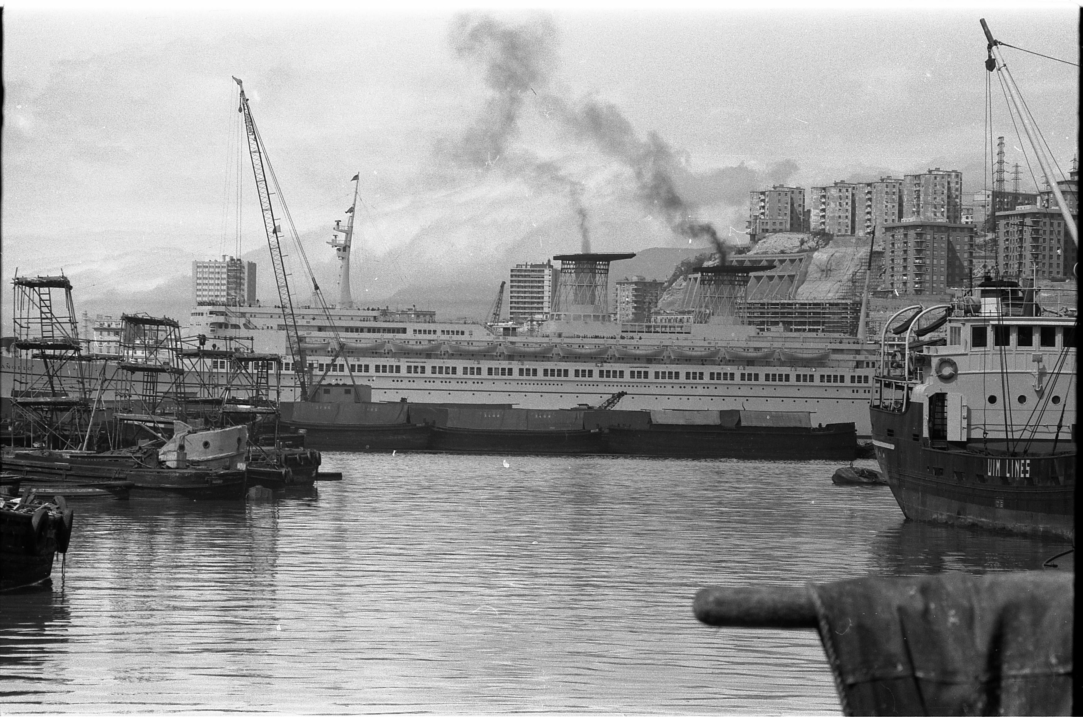 La Michelangelo nel porto di Genova